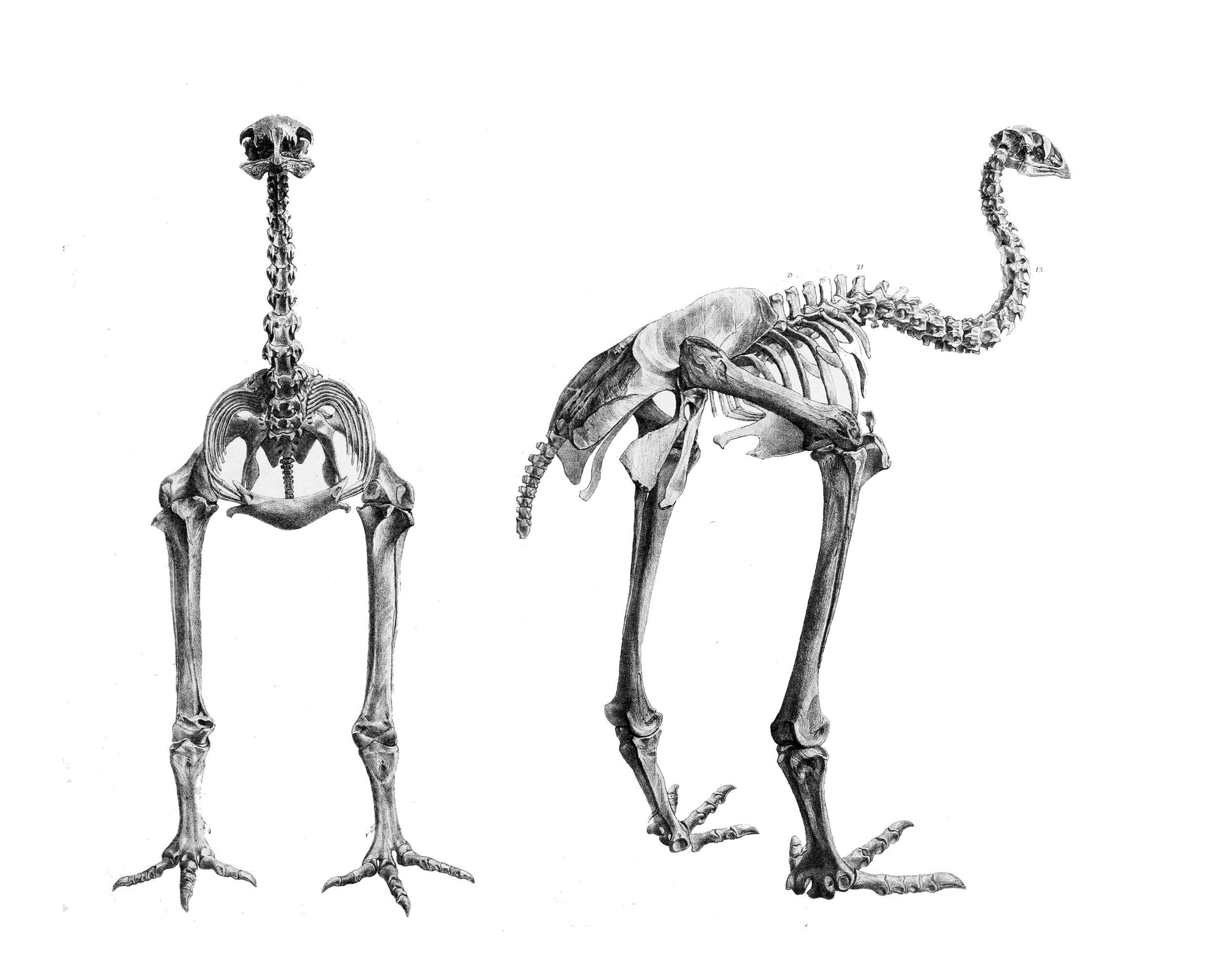 Dinornis parvus